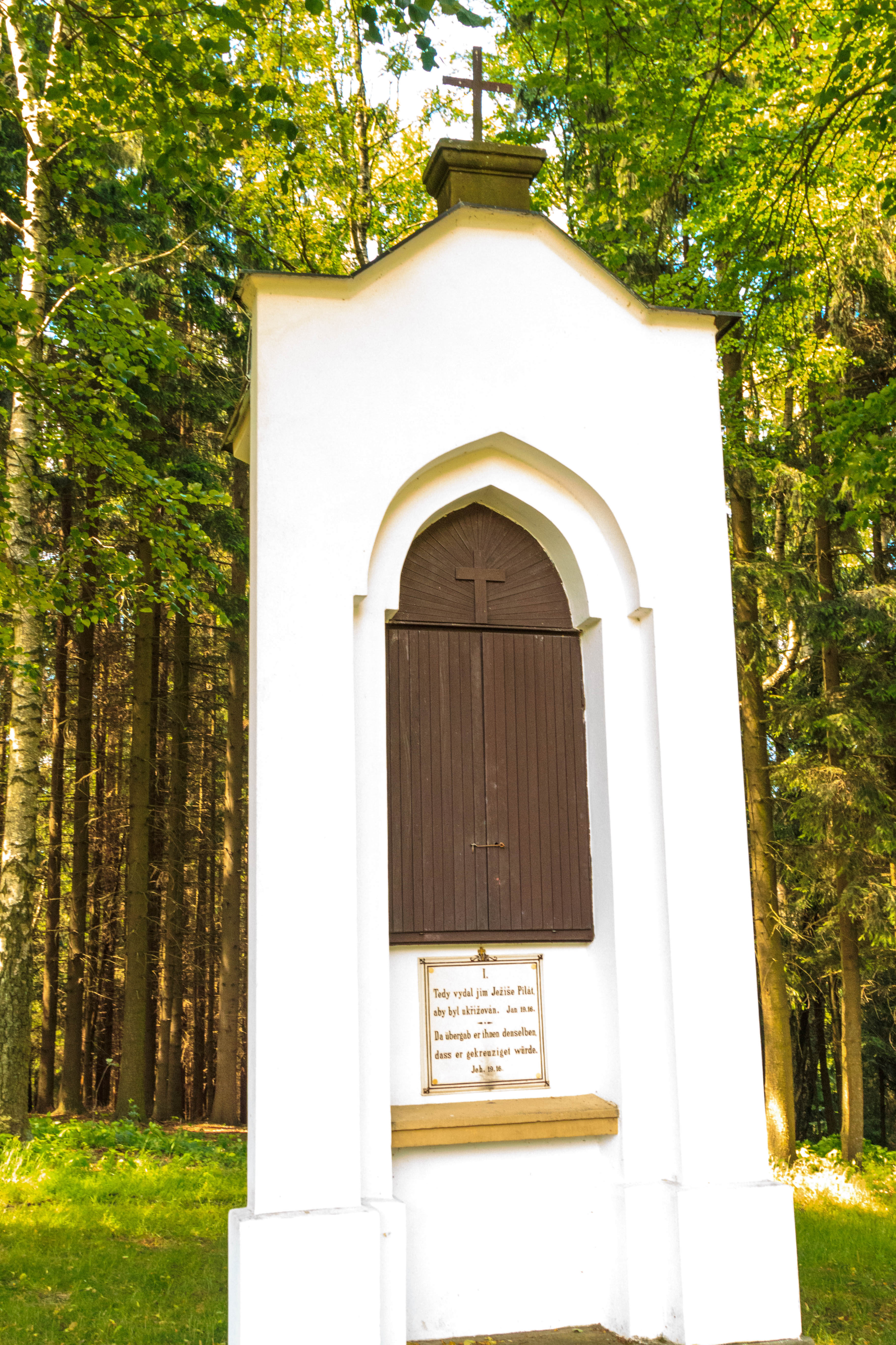 Křížová cesta na Mariánské hoře u Horní Čermné